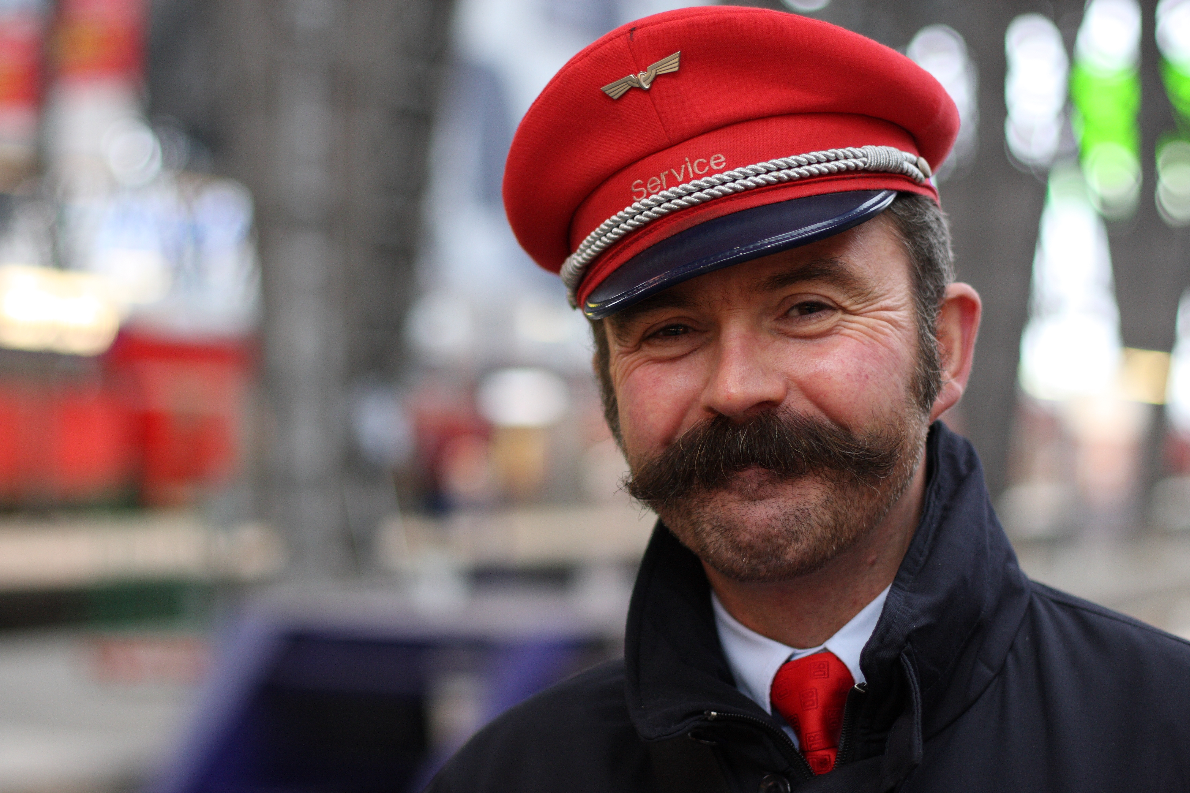 Frankfurt Hauptbahnhof, Germany